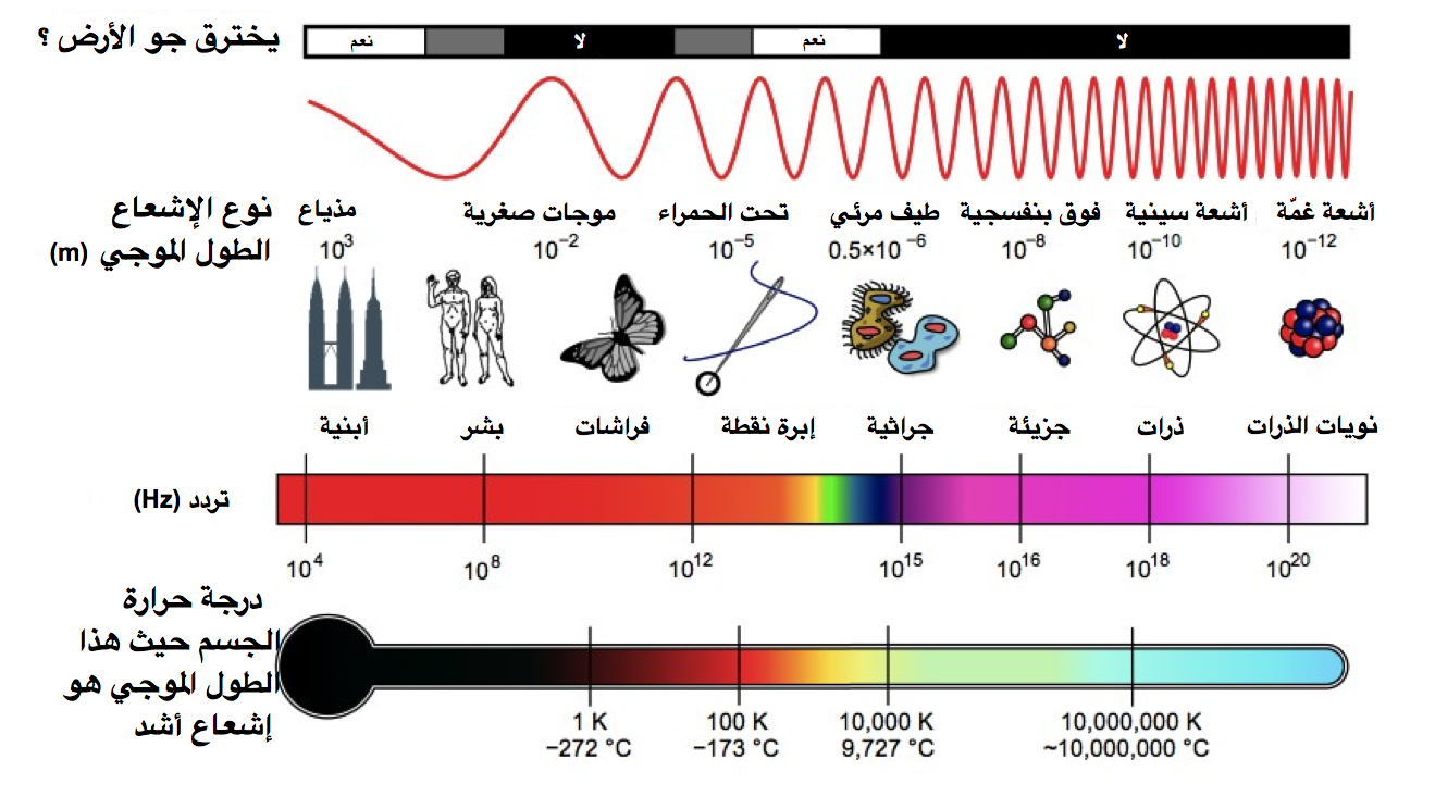 رسم توضيحي للطيف الضوئي , يوضح النوع , طول الموجة , التردد , حرارة الجسم الأسود